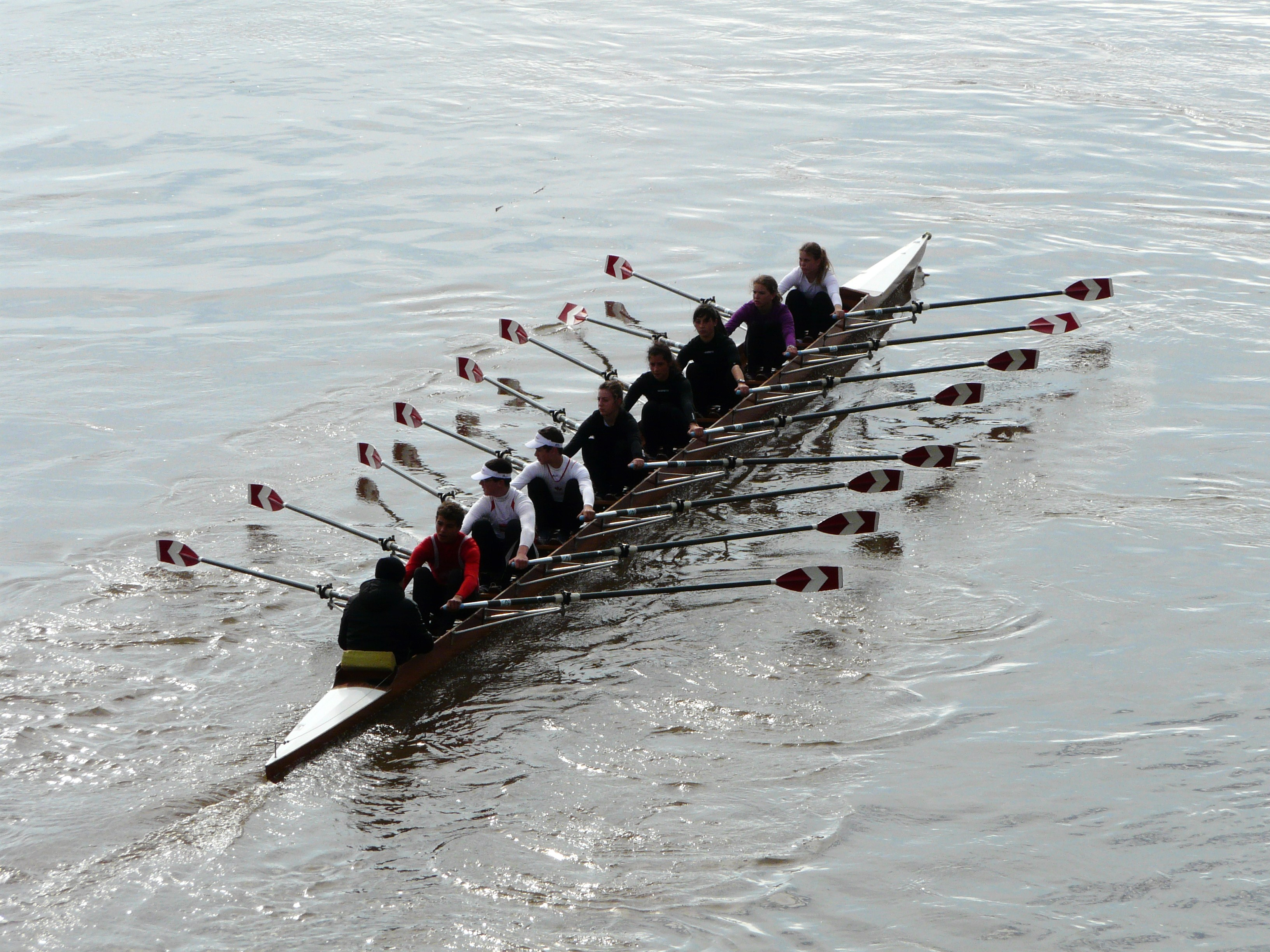 Entraînement d'aviron sur la Dordogne à Bergerac, Dordogne, France (8 de couple barré).